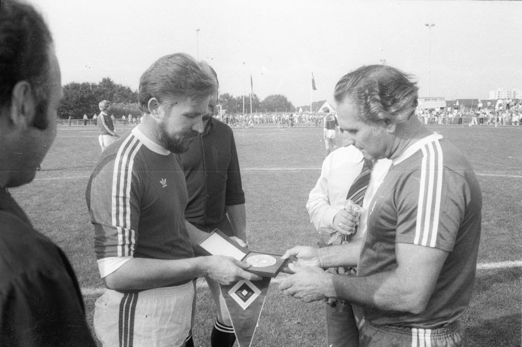 Eröffnungsfeier und Stadionübergabe an den TuS Hasseldieksdamm/Mettenhof. Fußballspiel der Altstars des Hamburger SV (HSV) gegen eine Kieler Prominentenmannschaft. Im Bild SPD-Ratsherr Claus Möller (links) und der Spielführer des HSV Franz Klepacz (rechts).